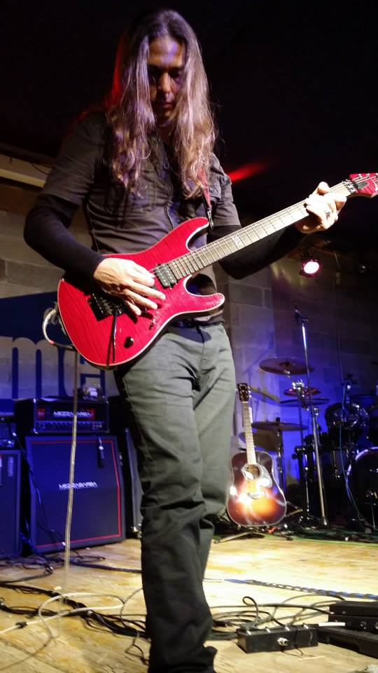 Kiko Loureiro e la sua Ibanez KIKO100